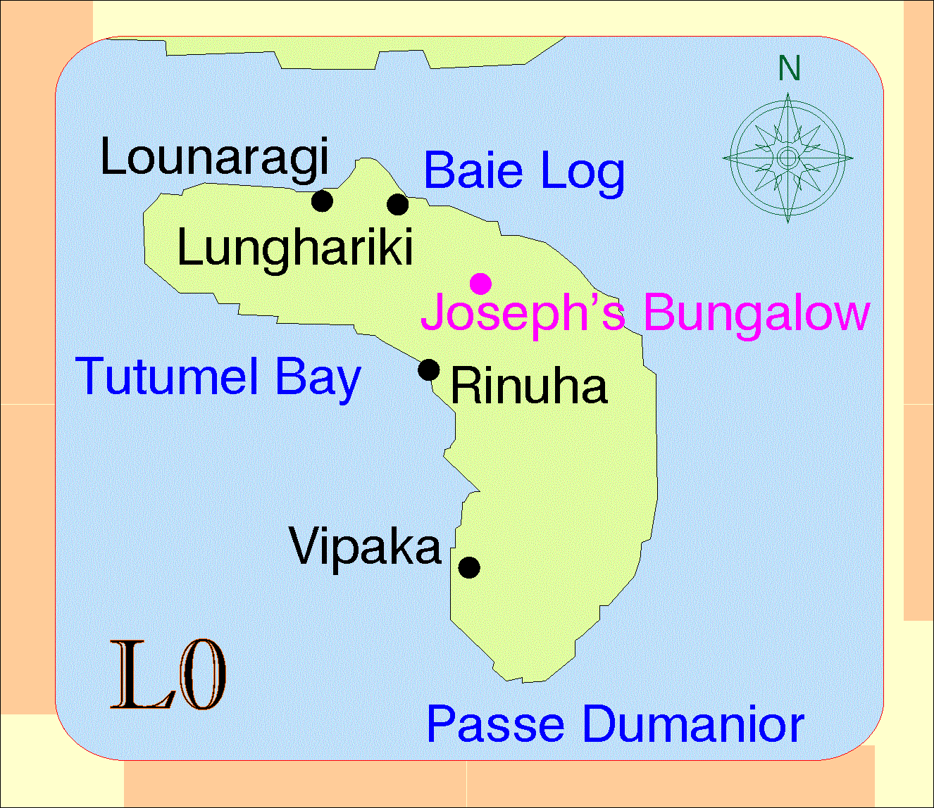 Карта на остров Ло.